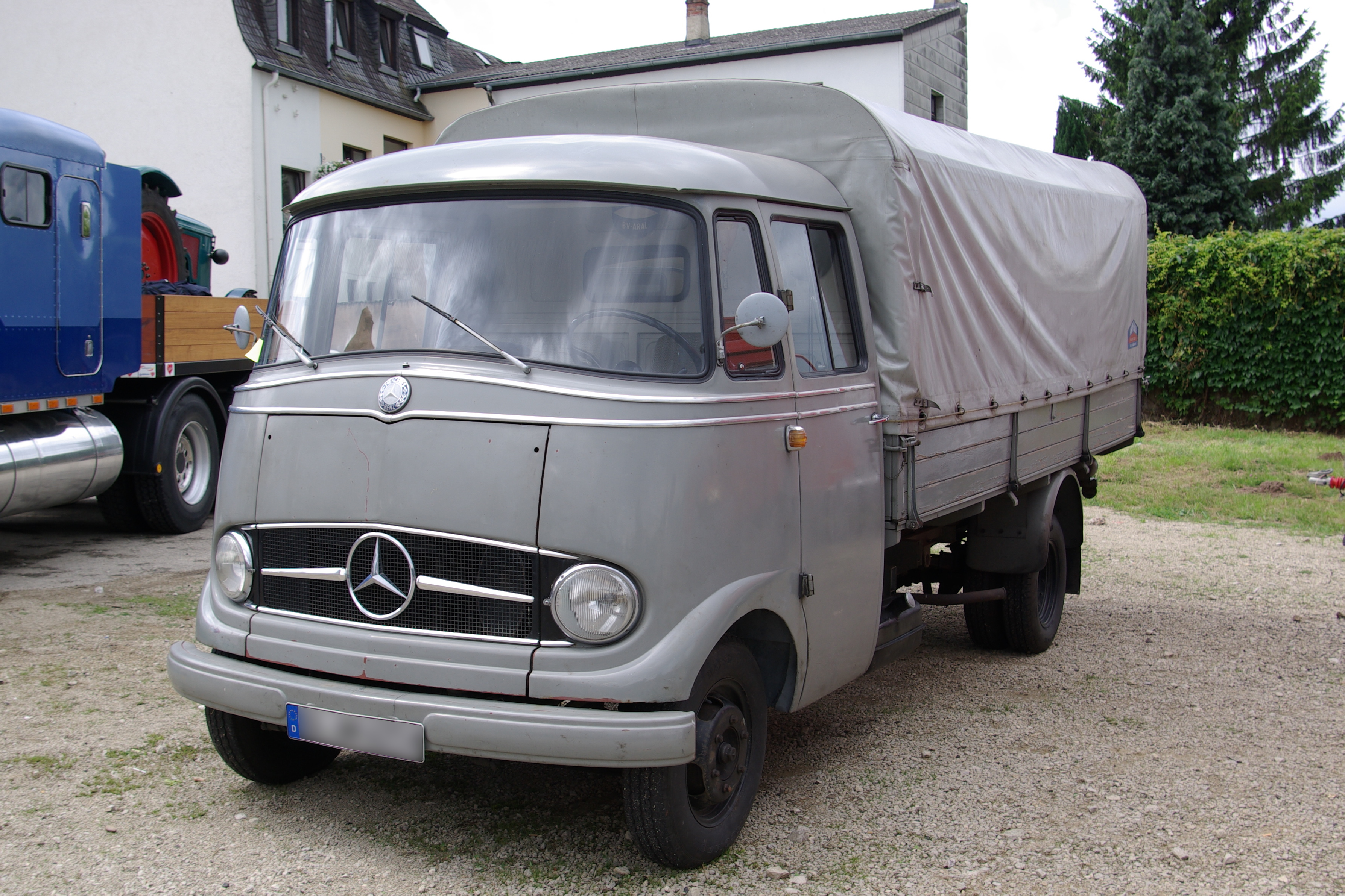 Mercedes L319